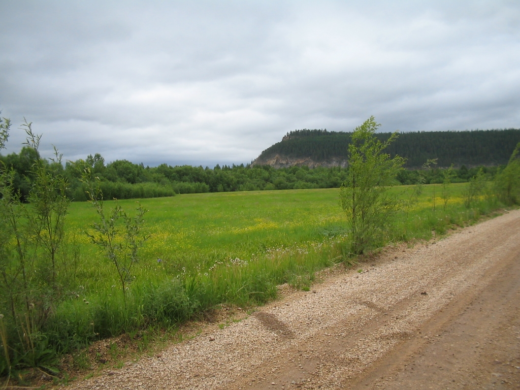 Автор: Светлана Иванова